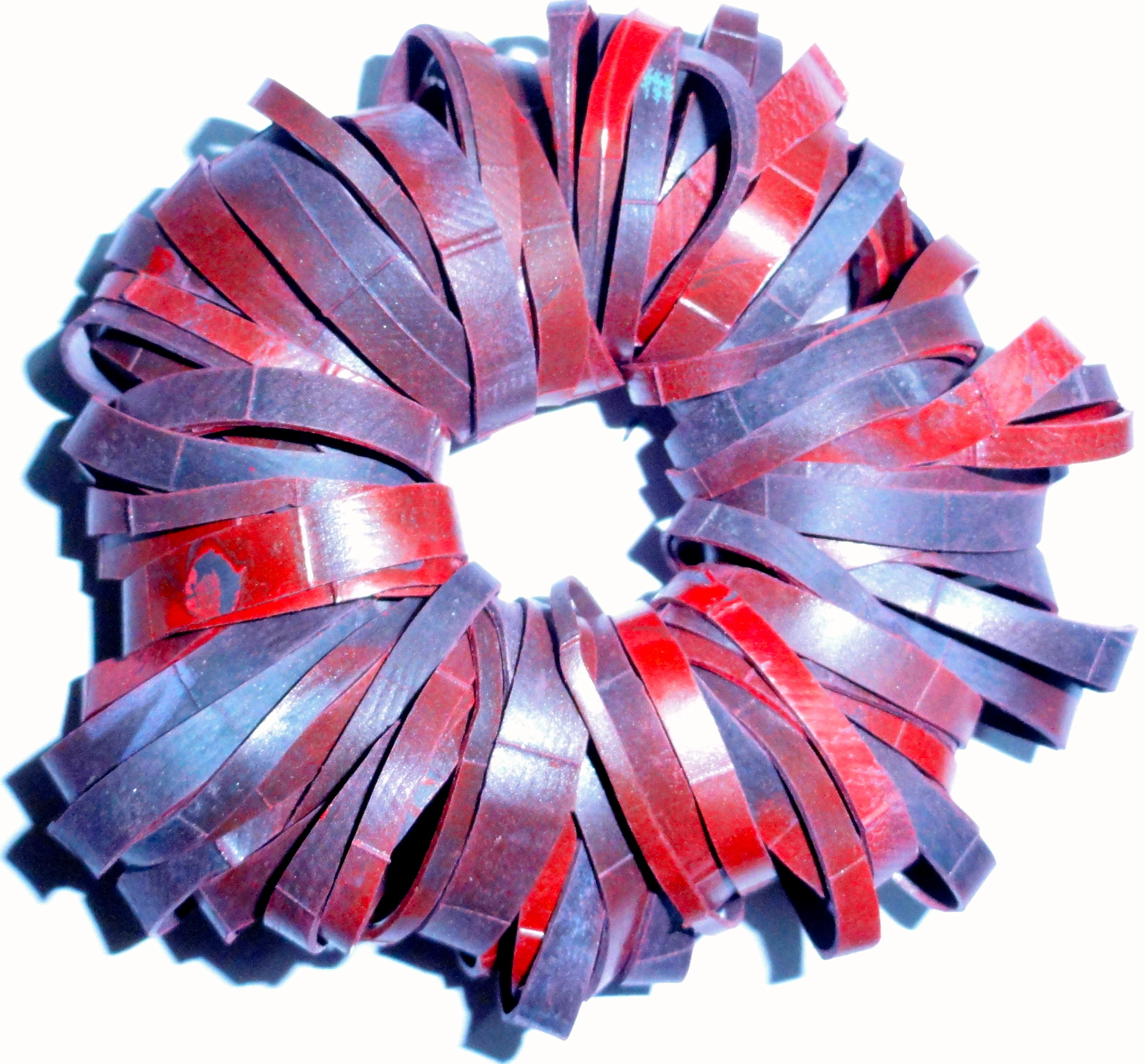 Le pitchak aux couleurs de Nice